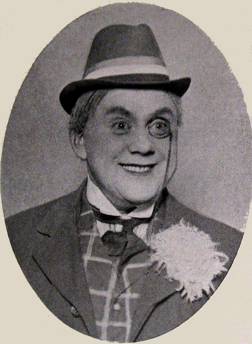 Carl Marius Alstrup (11. april 1877 i Sundbyvester - 2. oktober 1942 i Snekkersten) var en dansk skuespiller og sanger. Her i revyen Sommerrejsen 1909